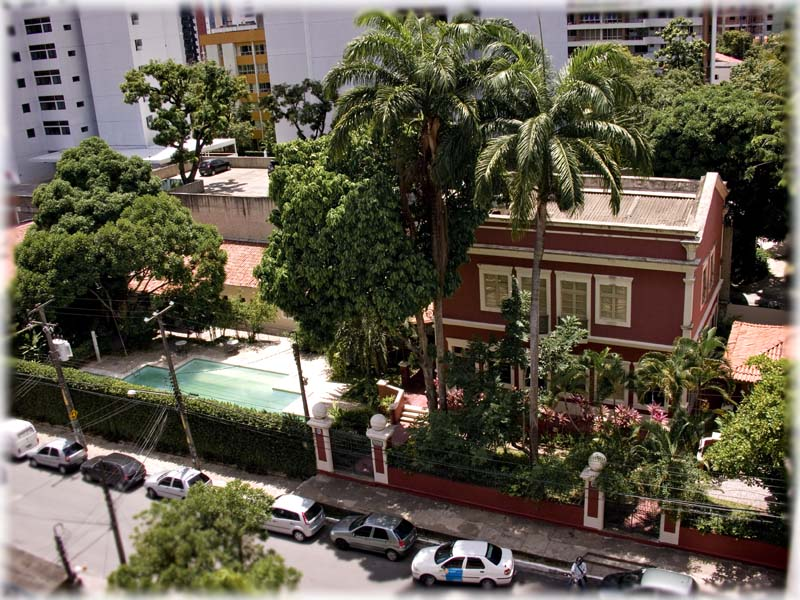 Reserva Técnica do artista plástico João Câmara Filho situada no bairro das Graças - Recife - PE